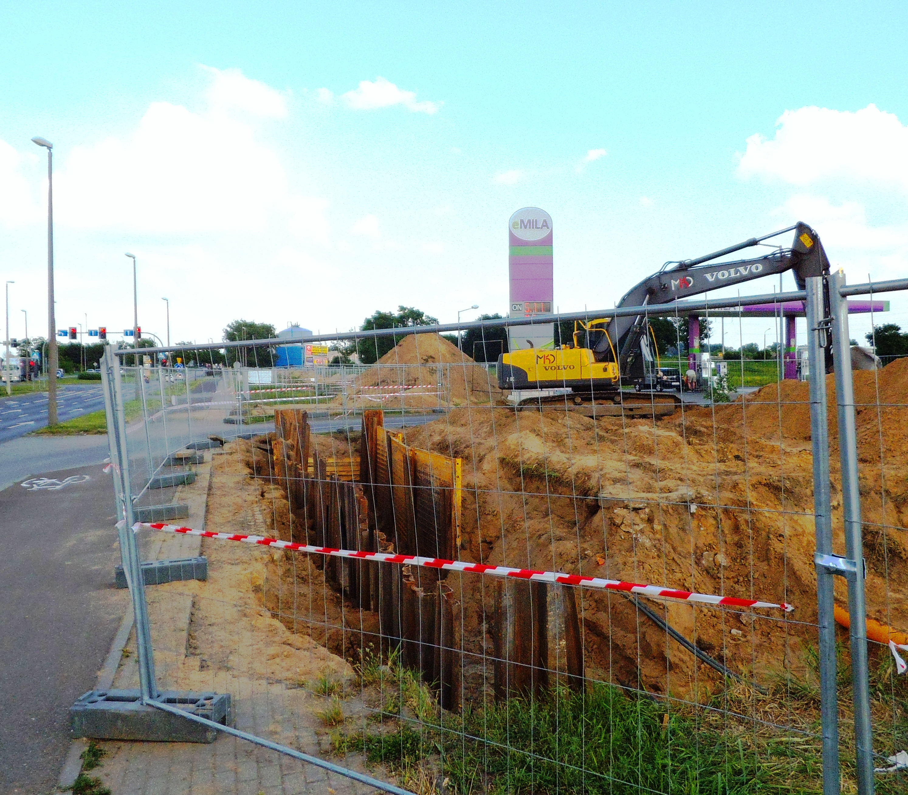 Geotermia Toruń, budowa rurociągu